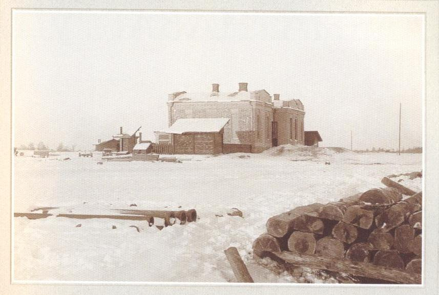 Беларуская (тарашкевіца): Шацілавічы (Šaciłavičy), пляц Прывакзальны (plac Pryvakzalny). Чыгуначная станцыя